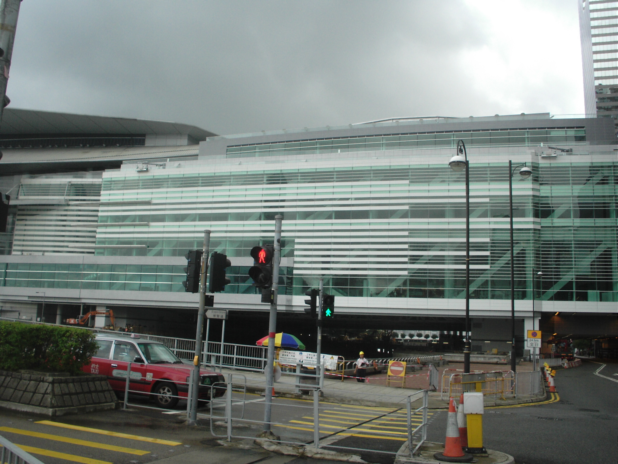 擴建後的灣仔會展中庭